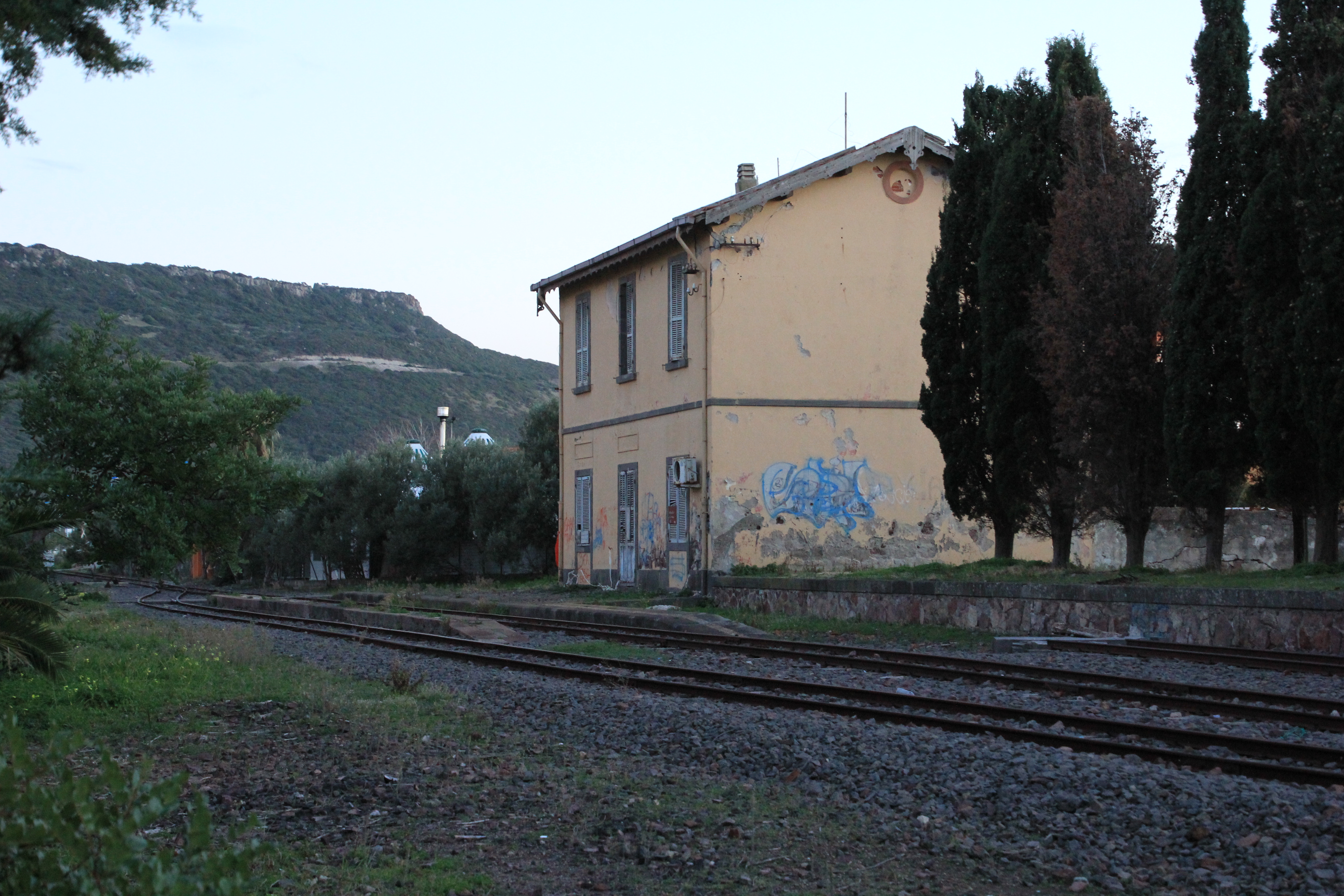 Bosa, stazione ferroviaria di Bosa Marina